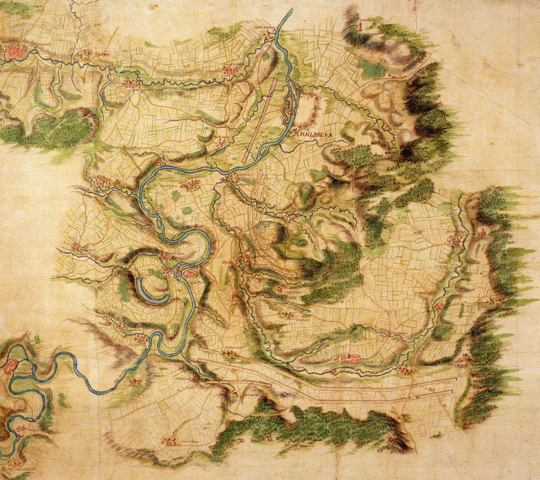 Heilbronn und Umgebung, Ausschnitt aus einer Karte von Samson Schmalkalder